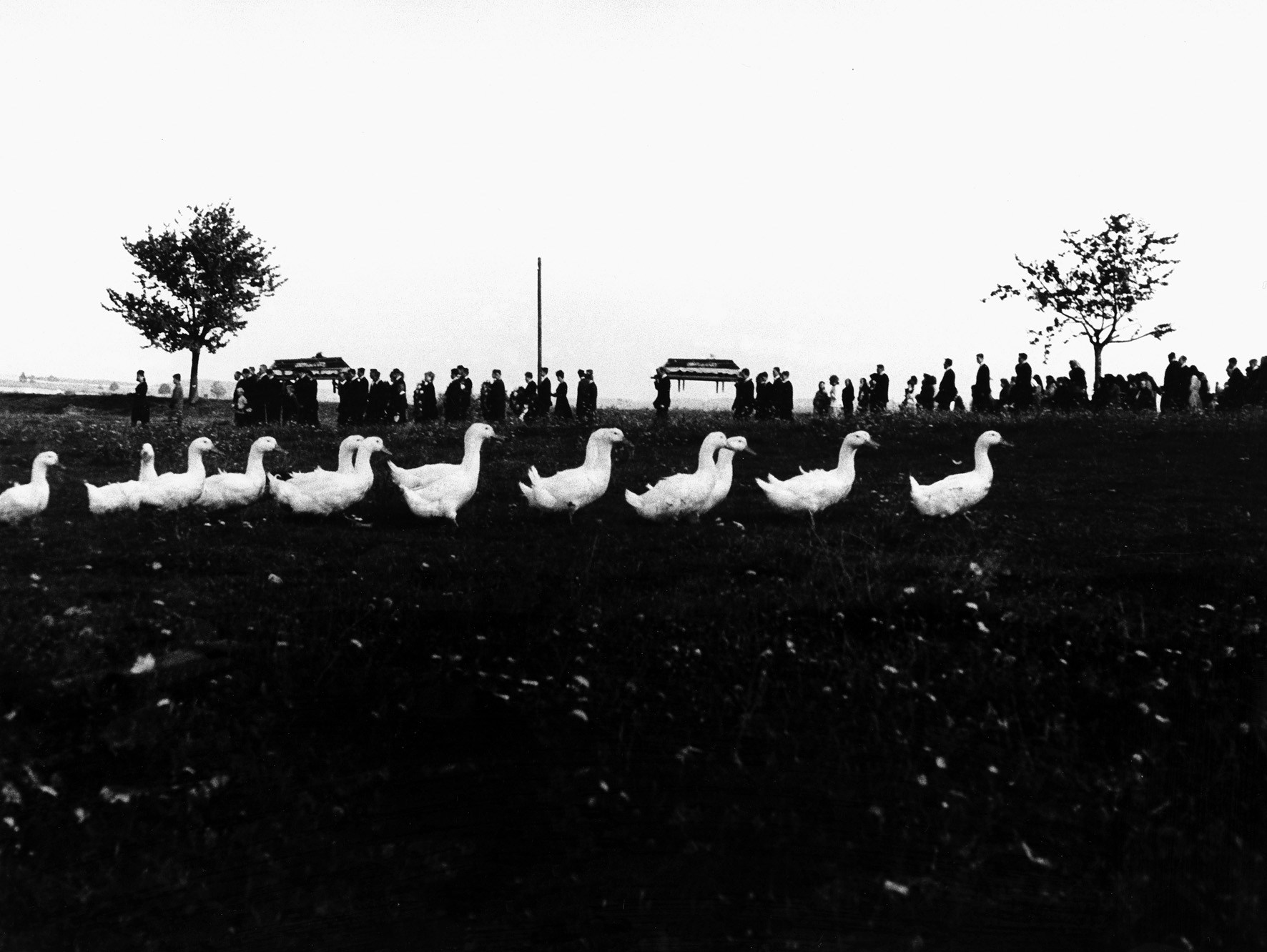 Jindřich Štreit´s archive